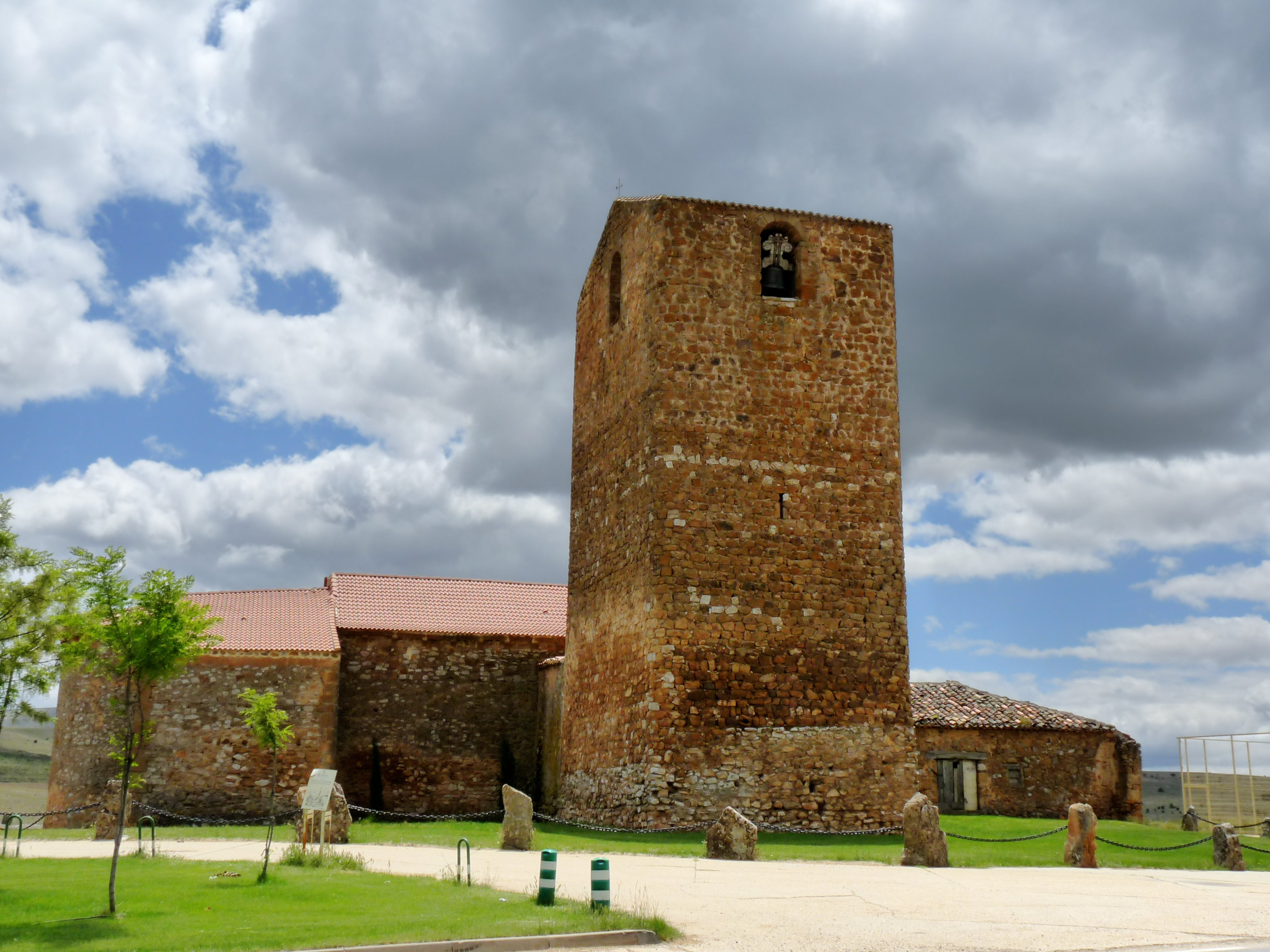 Aldealpozo - Iglesia de San Juan Bautista s. XII-XIII - Torreón defensivo s. X